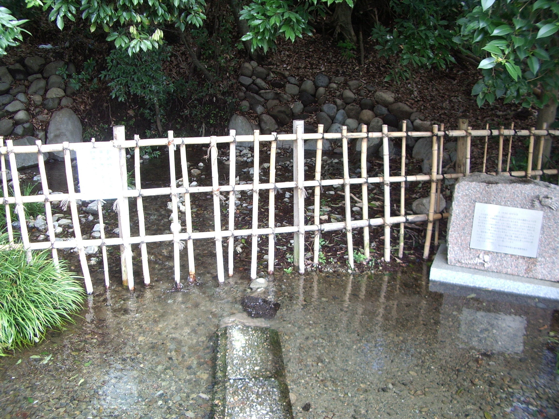 Mamashita Spring, Kunitachi, Tokyo